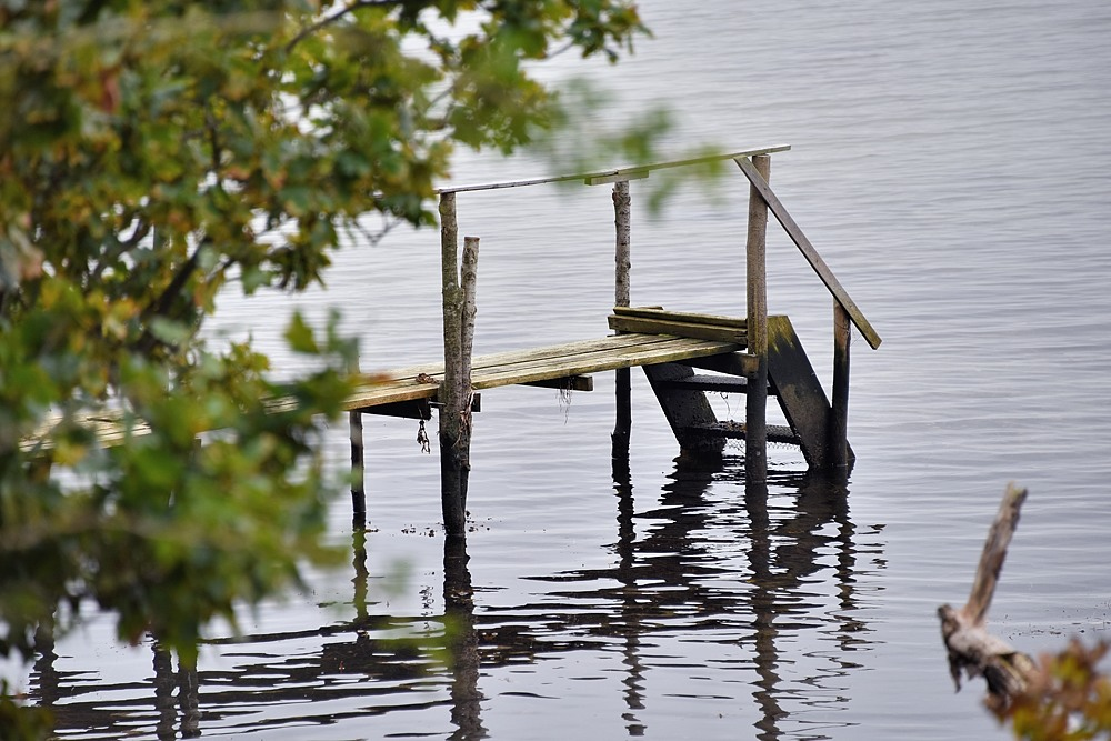 På vejen fra Nysted til Stubberup langs vandet